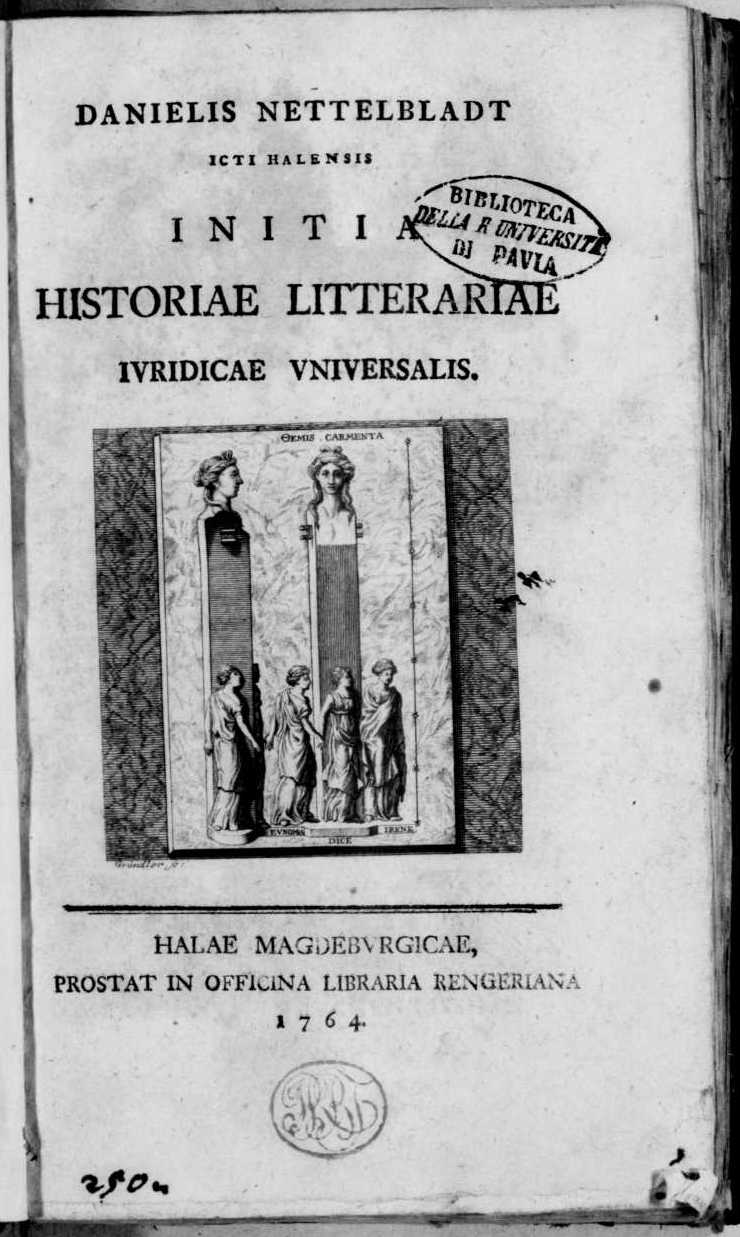 Frontespizio